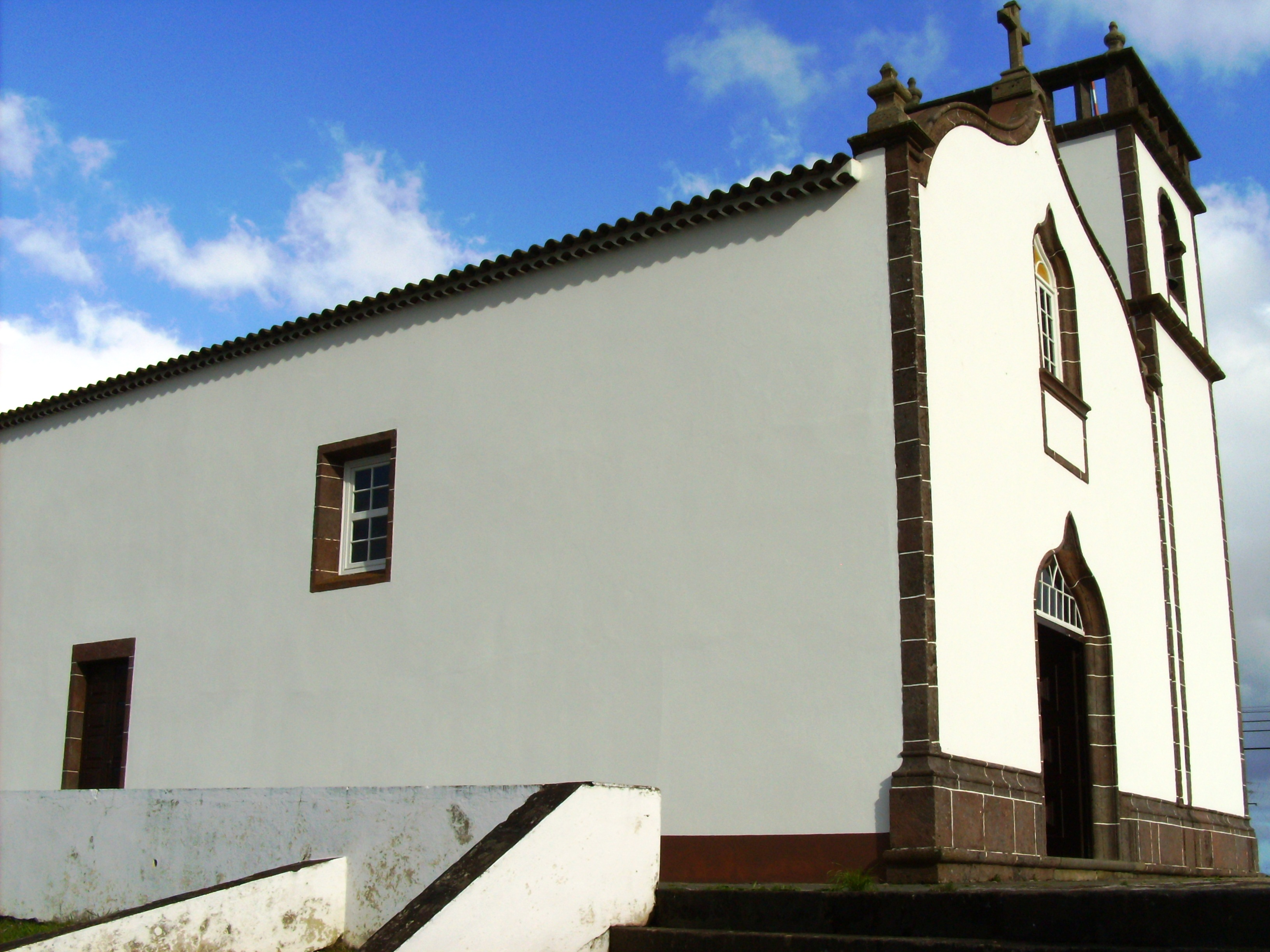 Igreja de Nossa Senhora do Bom Despacho (Almagreira), Ilha de Santa Maria (Açores), Portugal.